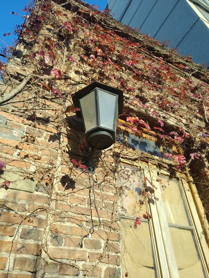 El parol rojo